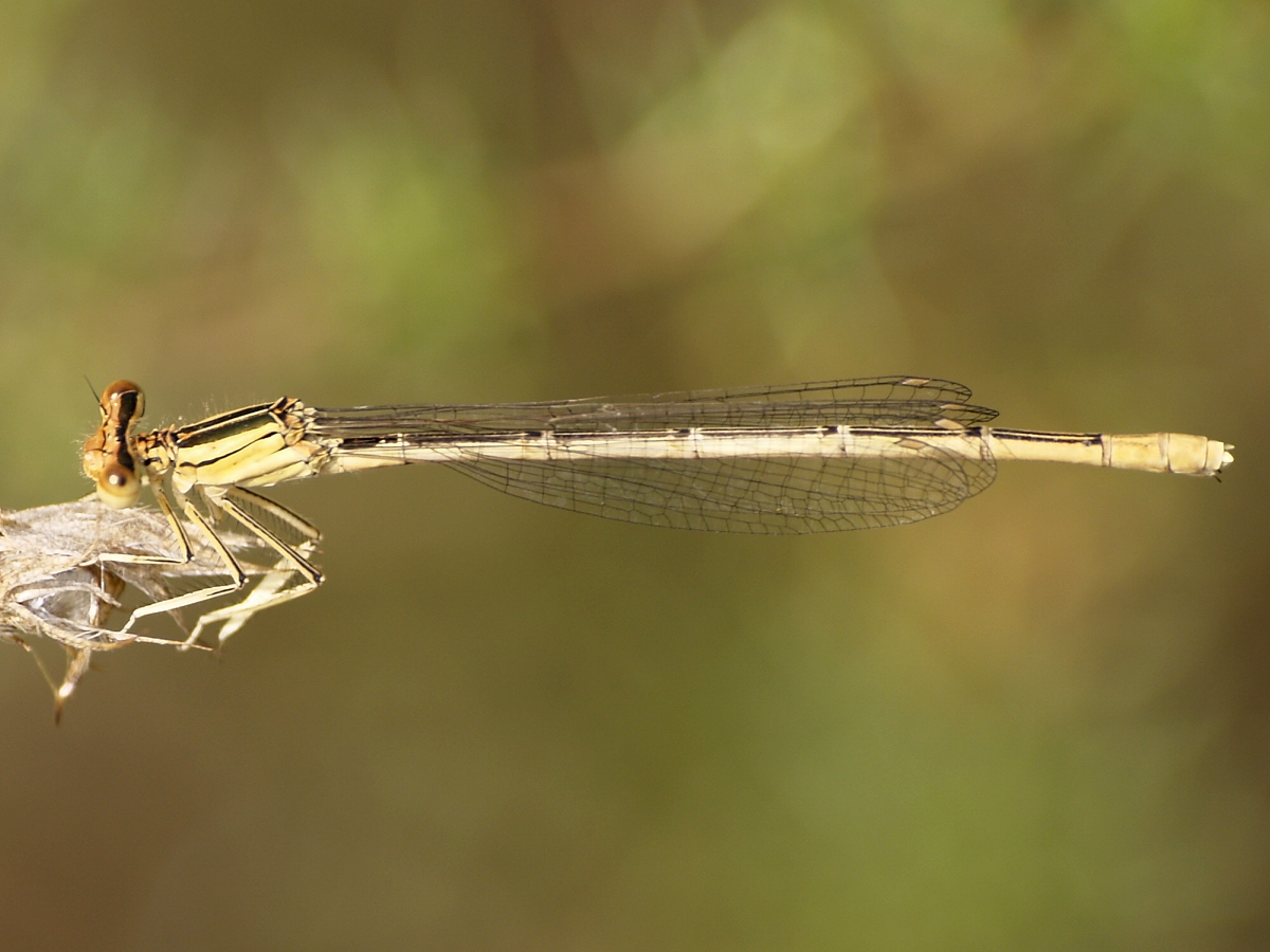 Platycnemis acutipennis female